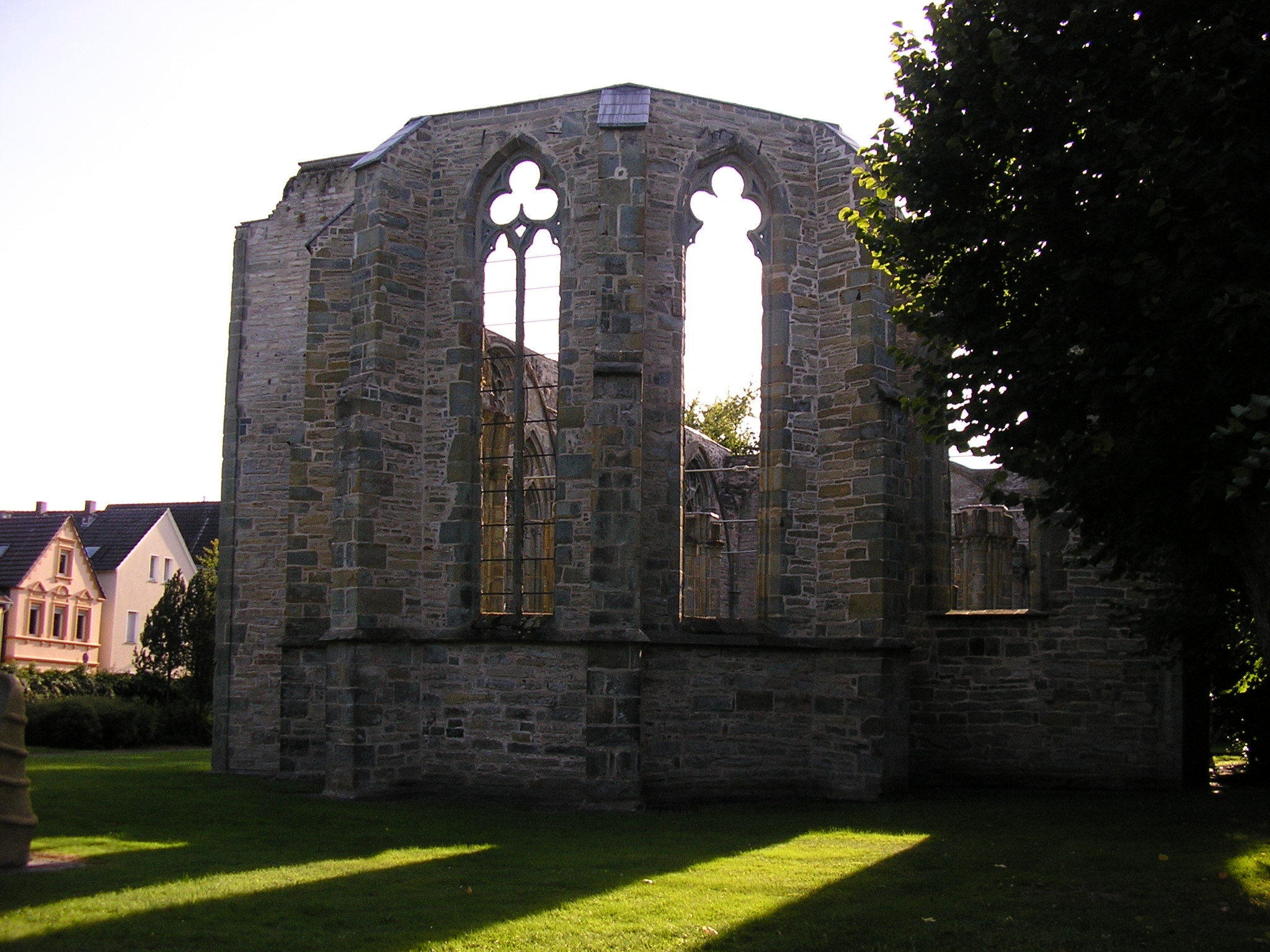 Ruine Augustinerinnenkloster zu Lippstadt